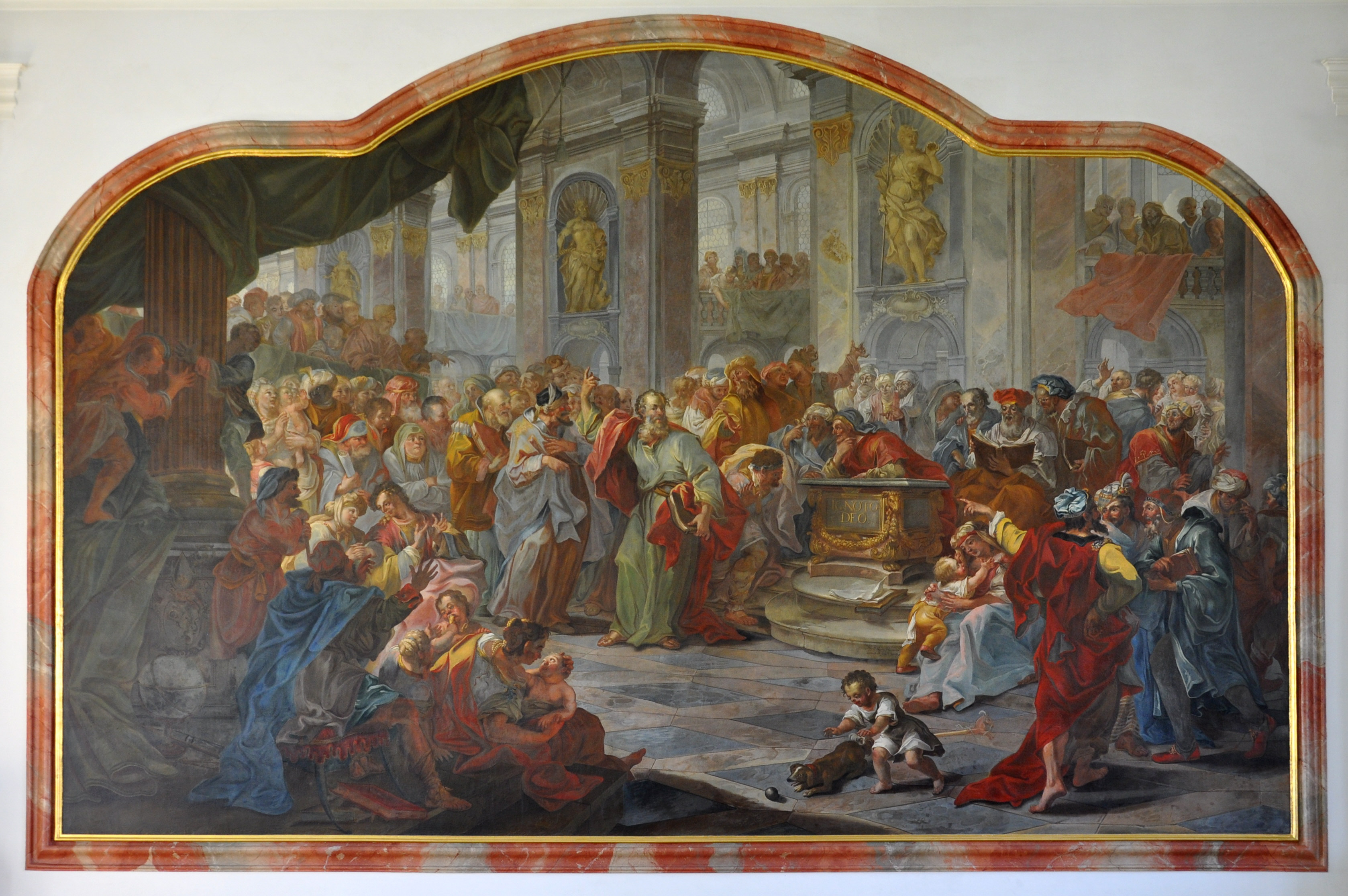 Ravensburg, Kloster Weißenau, Konventbau, Franz Georg Hermann: "Paulus vor dem Areopag", Tempera auf Putz (kein Fresko!), 1729